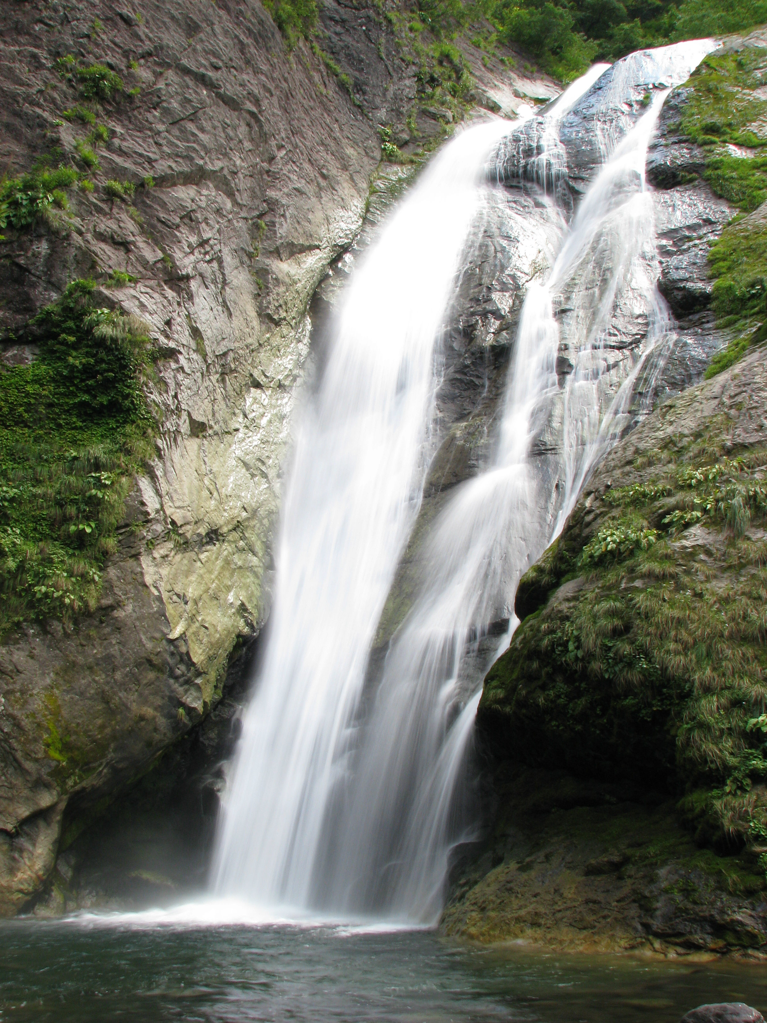 鈴ヶ滝（新潟県）